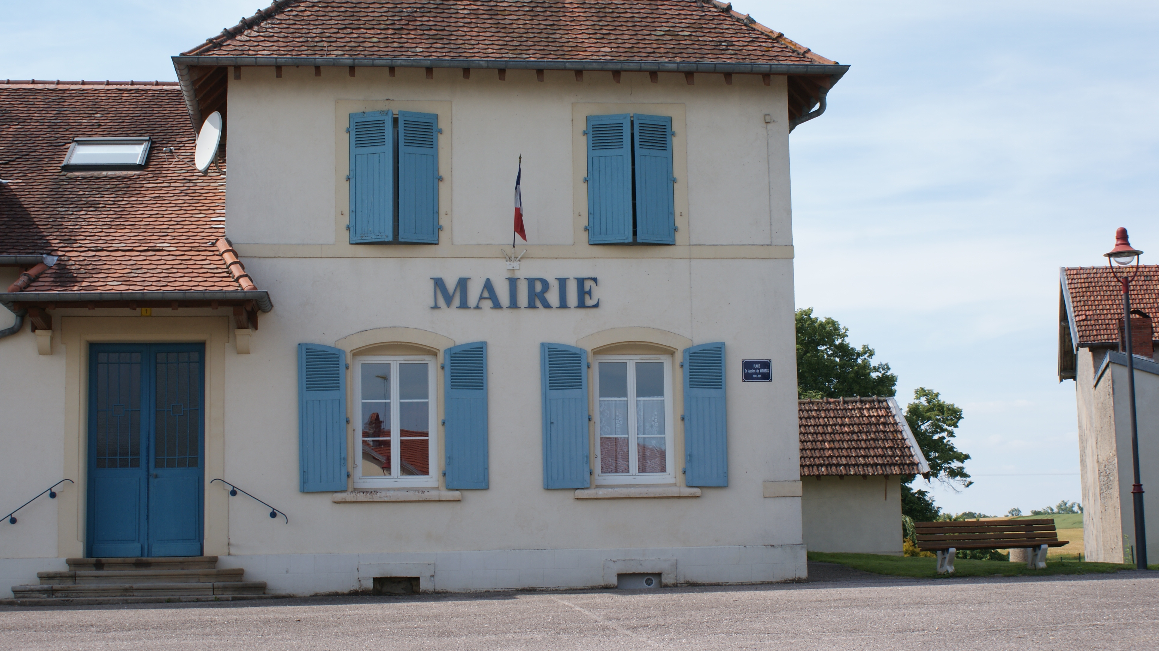 maire de Saint Maurice aux Forges